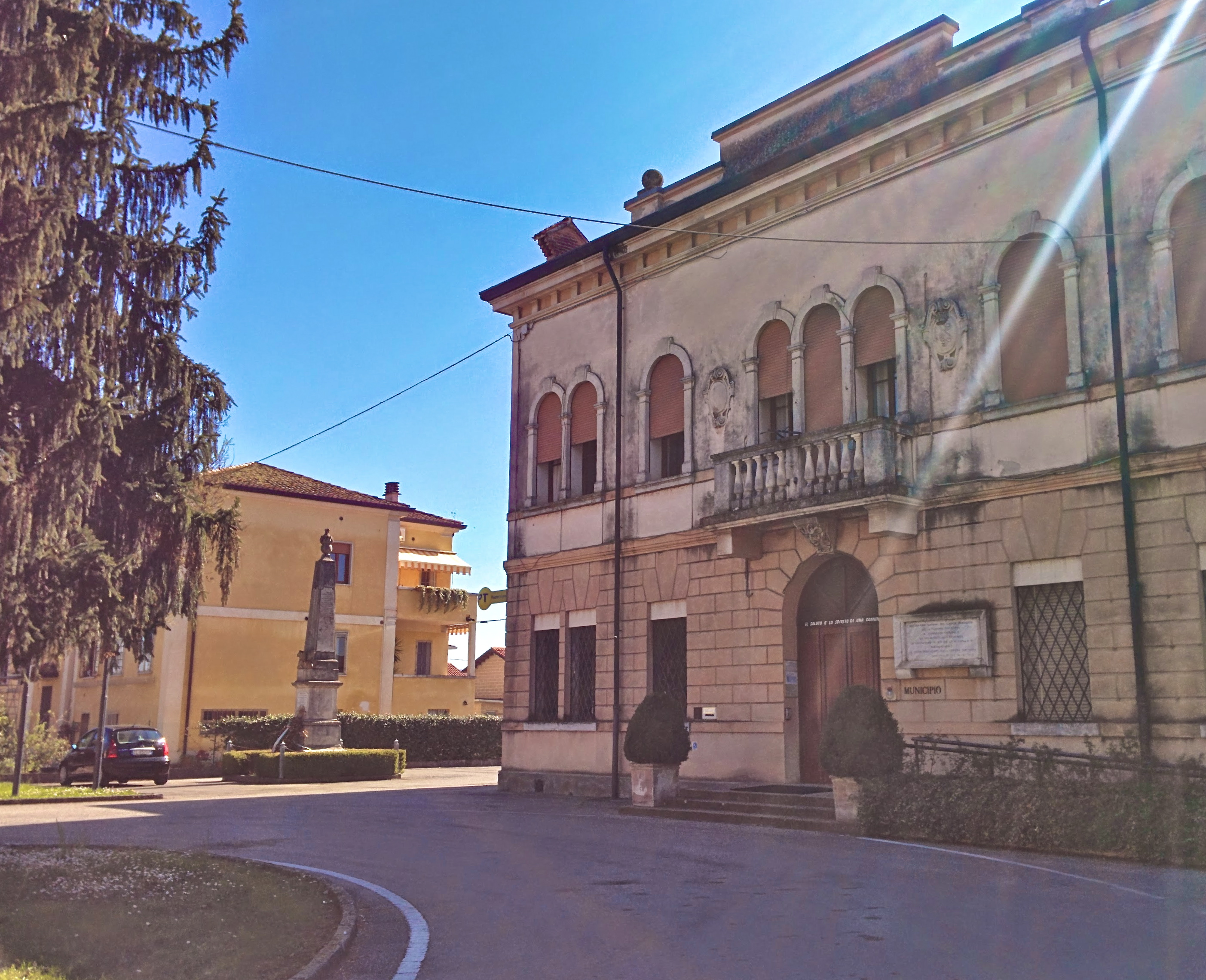 Municipio del Comune di Montegaldella